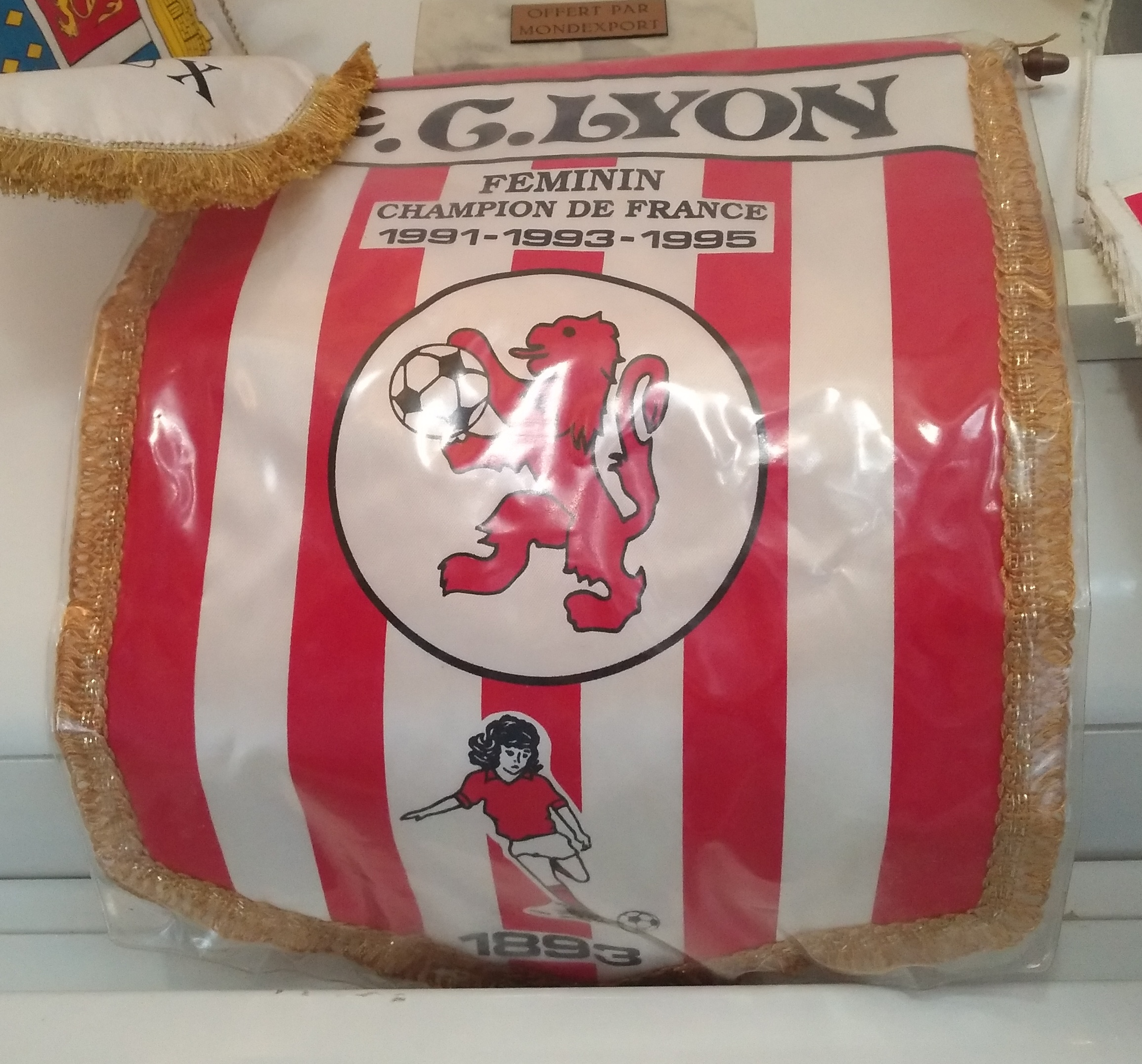 Fanion du FC Lyon féminin, champion de France 1991-1993-1995, dans les locaux de l'Olympique sportif Beaujolais au Bois-d'Oingt (Rhône, France).